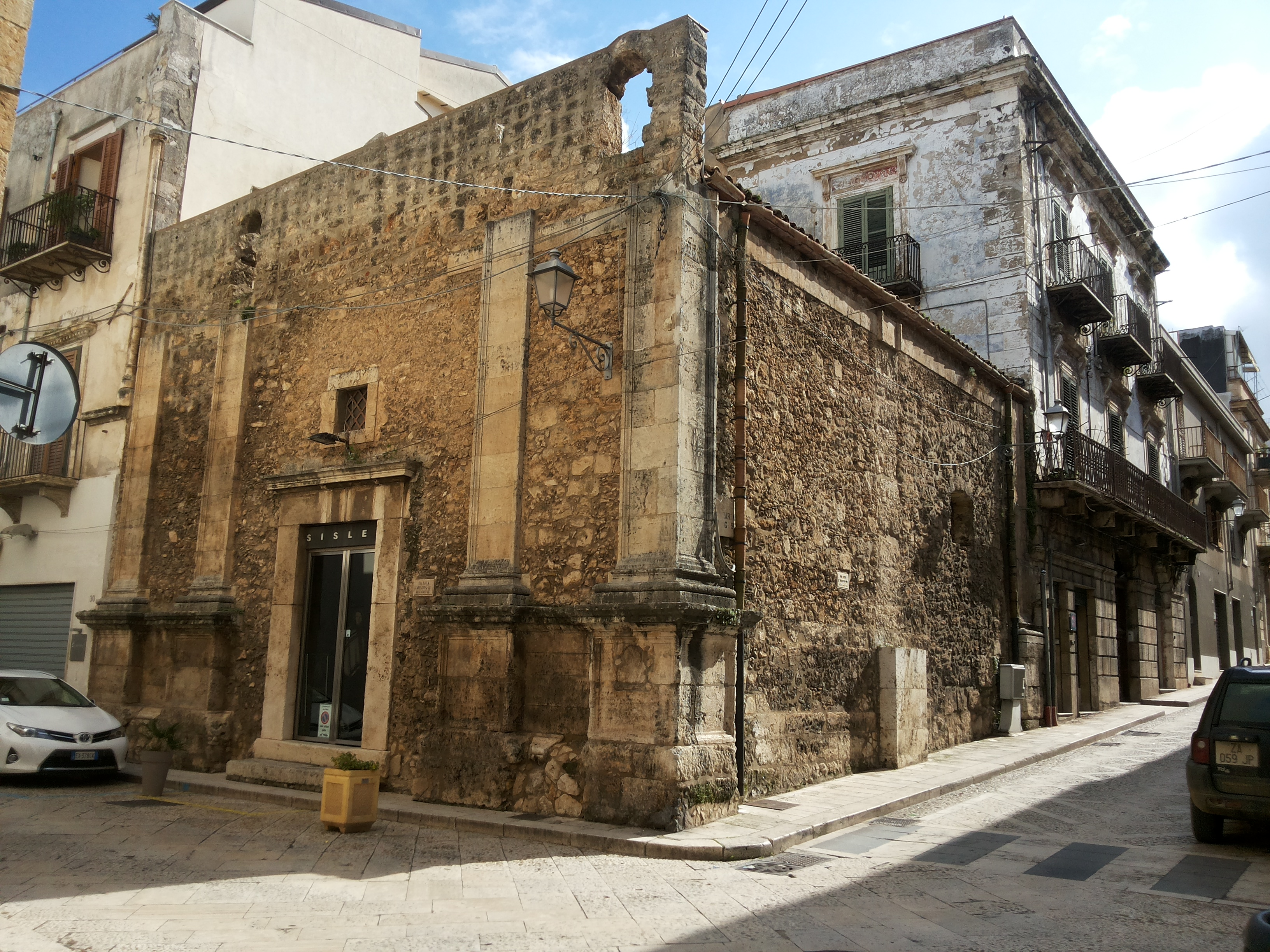 Chiesa di Santa Caterina (Alcamo)